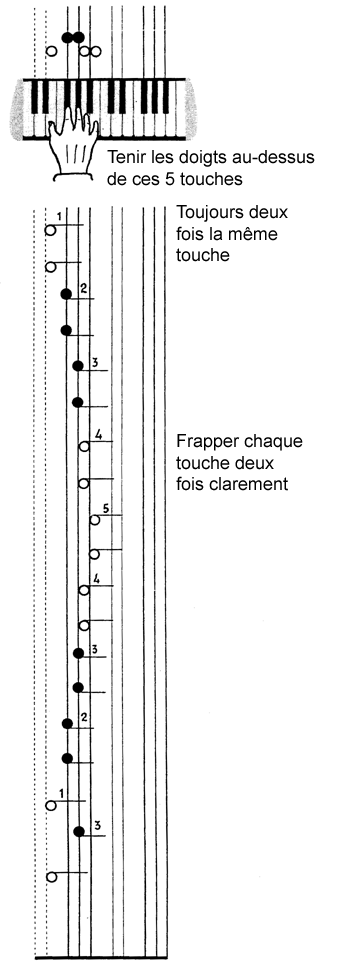 Klavarskribo